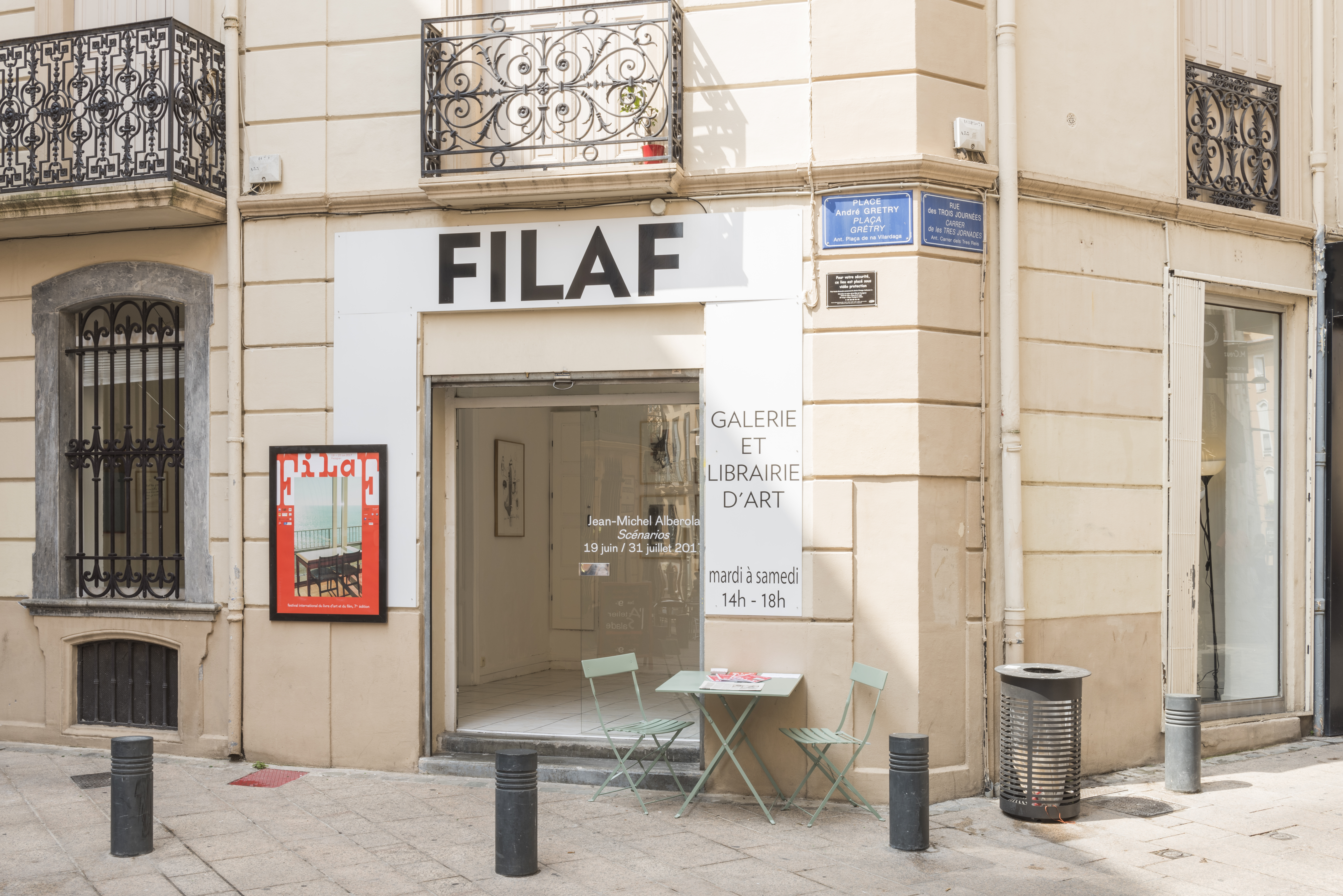 FILAF Gallery Perpignan